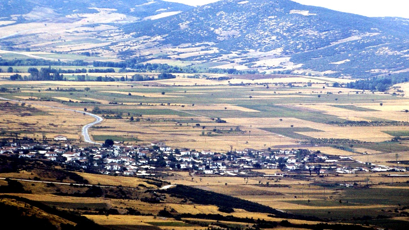 Τα Σανά του 2000